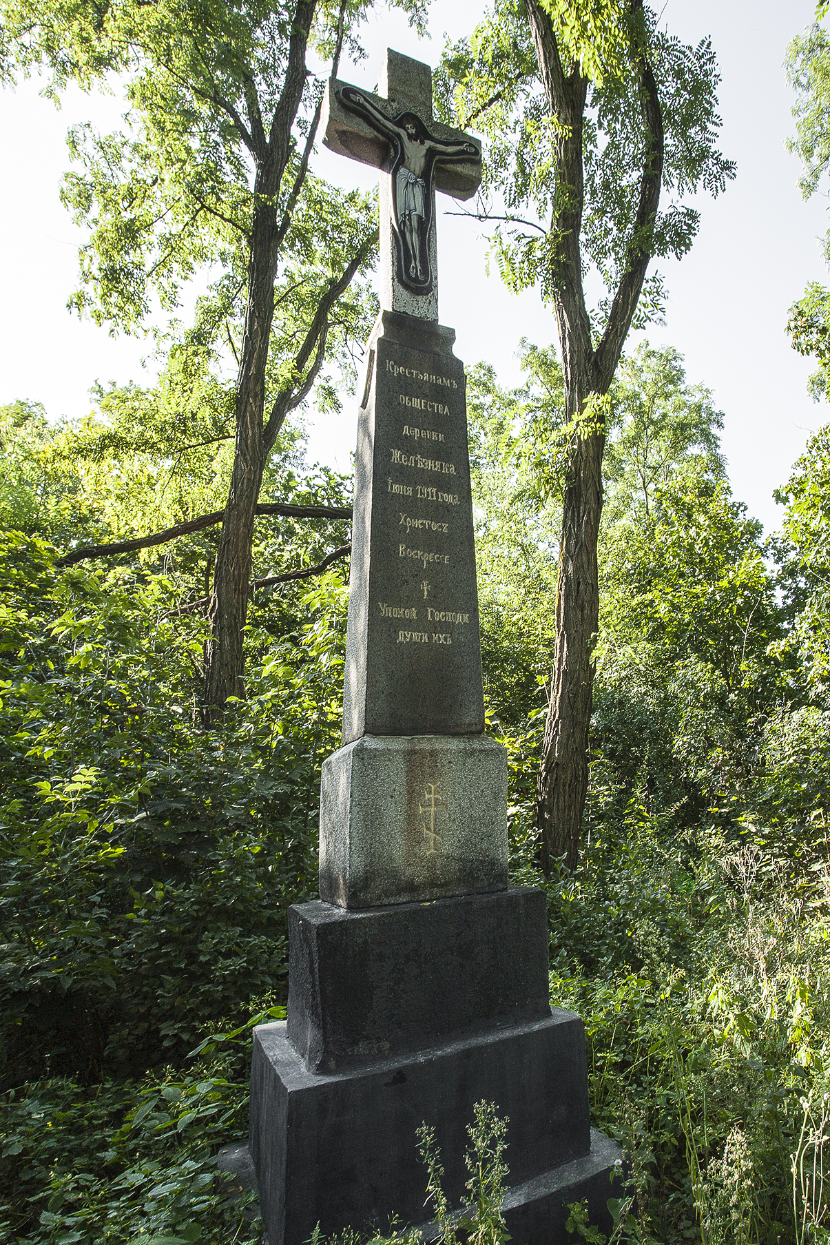 Відреставрований пам'ятний хрест на старому цвинтарі у с. Залізня